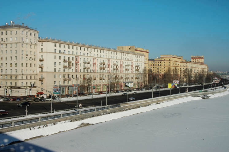 Вид на Фрунзенскую набережную с Пушкинского пешеходного моста.